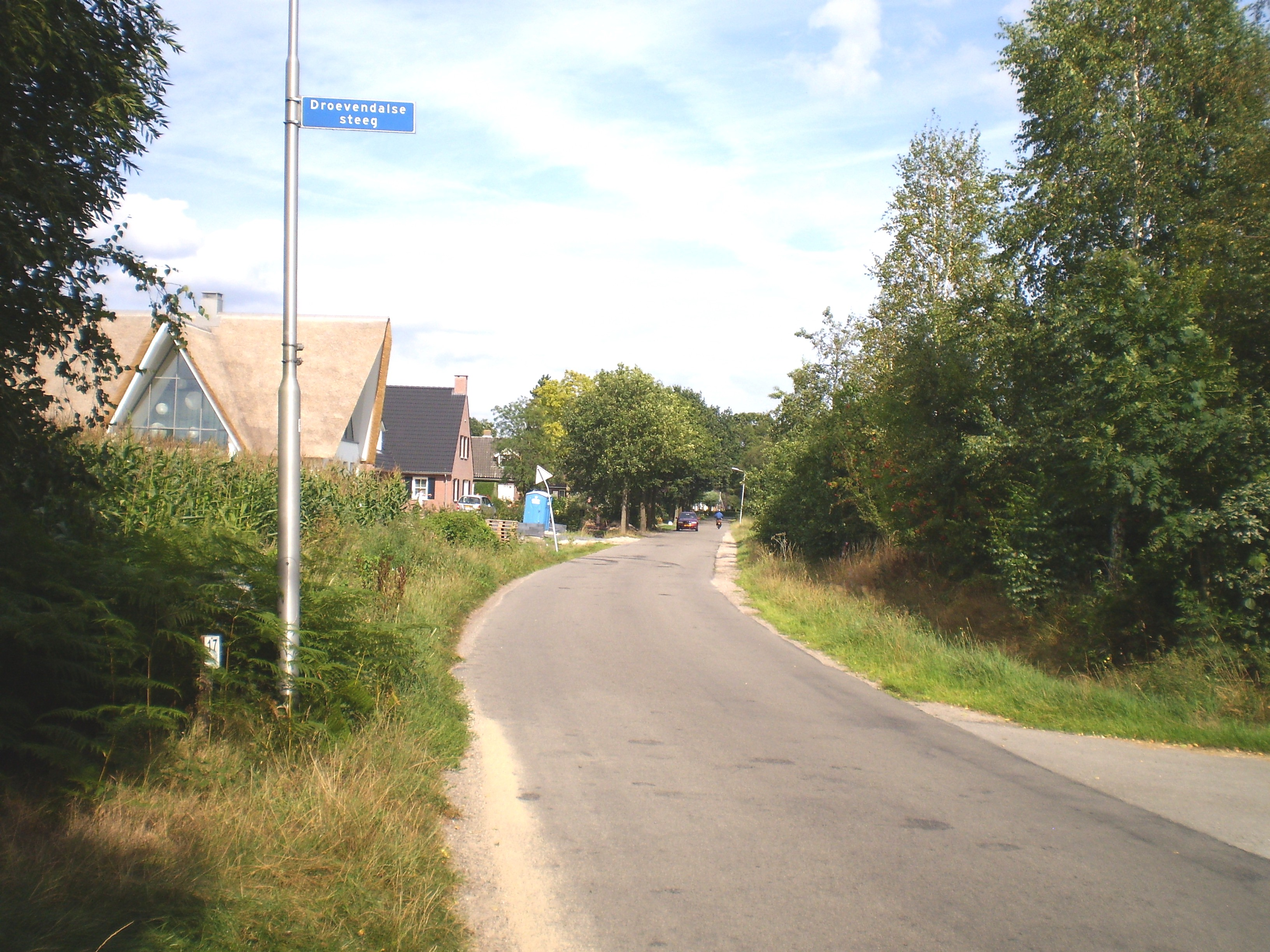 Coelhorsterwei rjochting Amersfoart